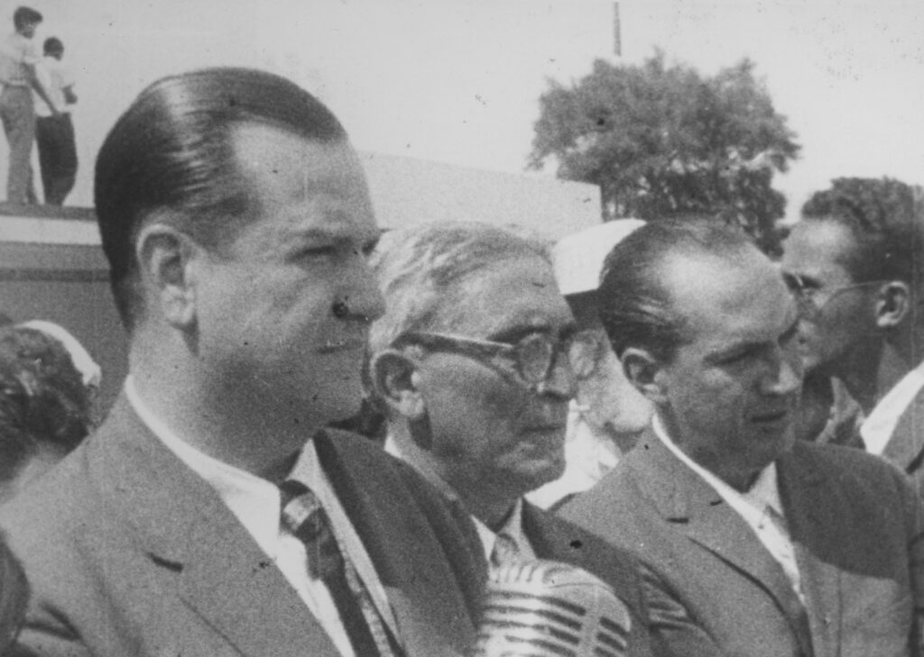 Rafael Caldera, Pedro del Corral y Lorenzo Fernández. Los tres firmantes por COPEI del Pacto de Puntofijo.